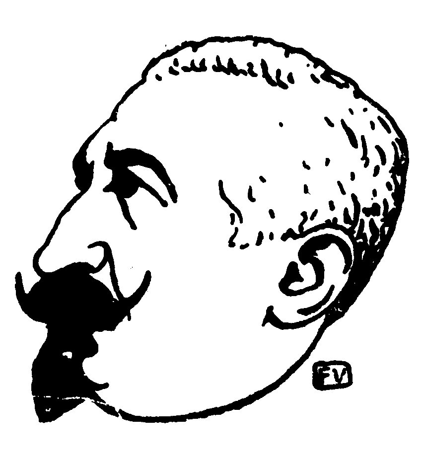 Portrait of French poet Laurent Tailhade (1854-1919) from Le Livre des masques (vol. I, 1896) by Remy de Gourmont (1858-1916)